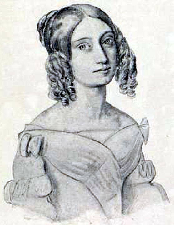 Pauline Hase (geb. Härtel; 1809-1885) Ehefrau von Karl August von Hase